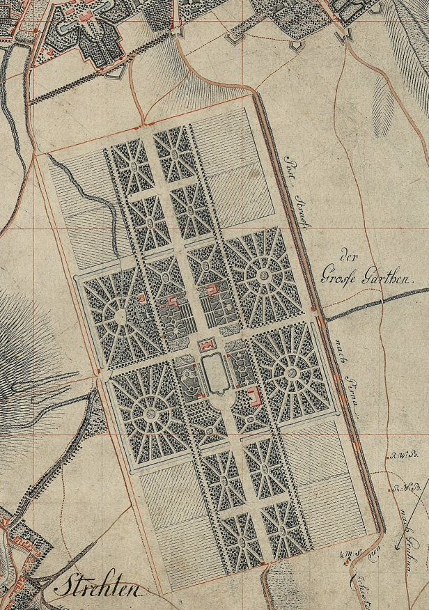 Ausschnitt aus Blatt 262 der Meilenblätter von Sachsen: Großer Garten